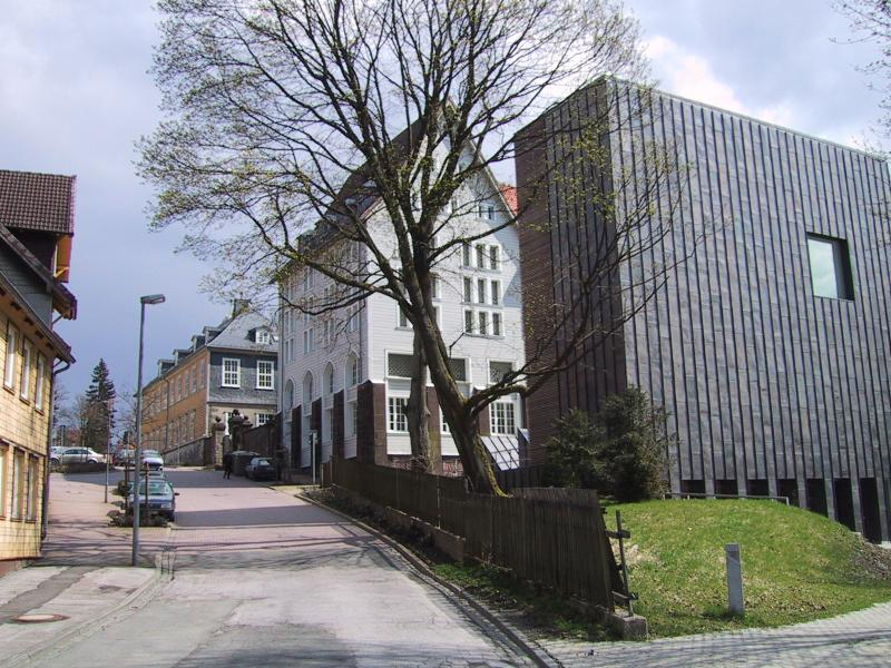 Oberbergamt, Bergbauarchiv, Clausthal-Zellerfeld